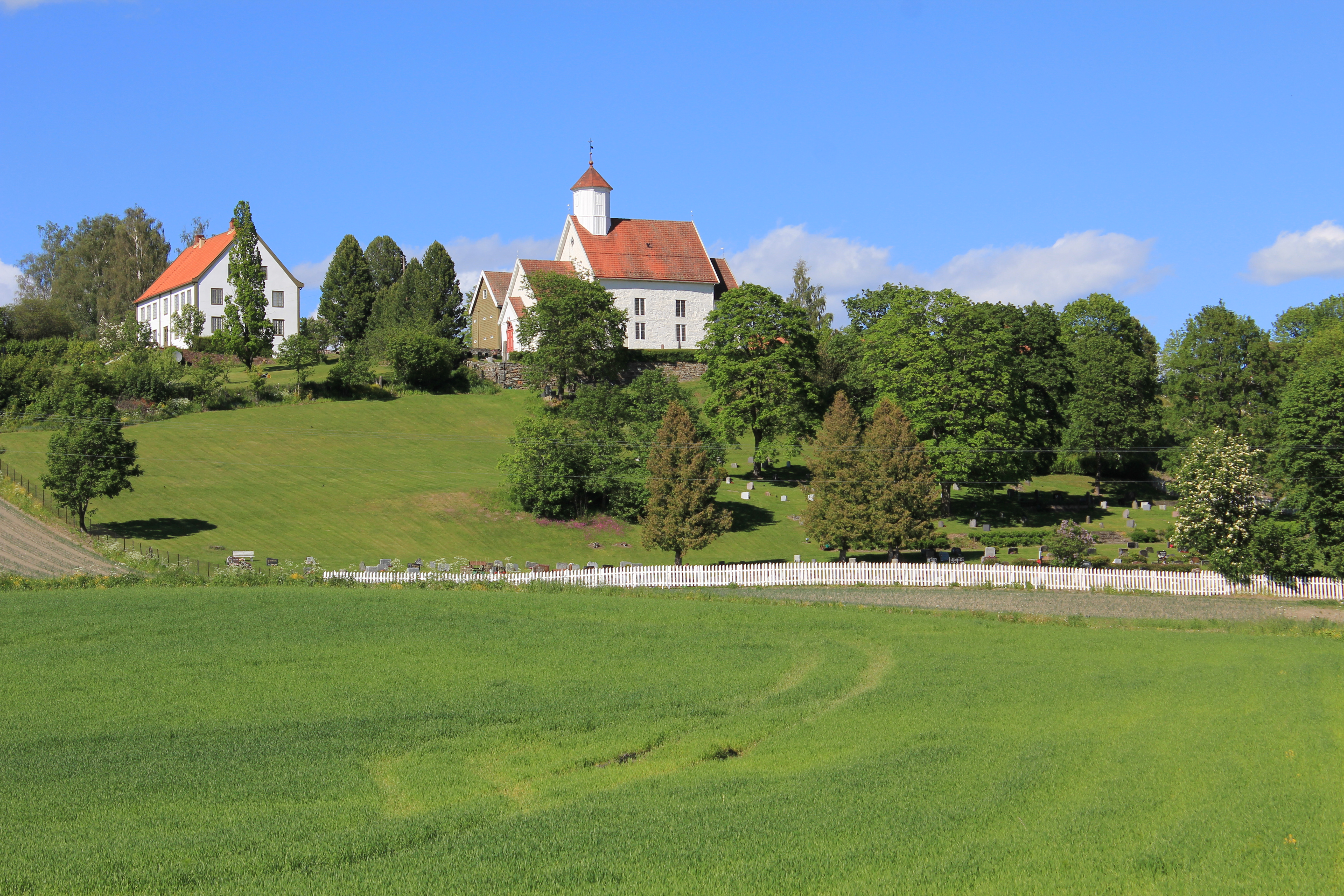 Balke kirke i kulturlandskapet